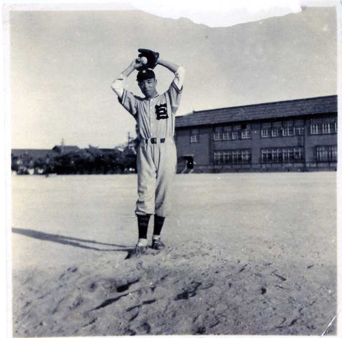 巨人入団直後の1941年(昭和16年)夏、母校・大津商の校庭で撮影(遺族提供)